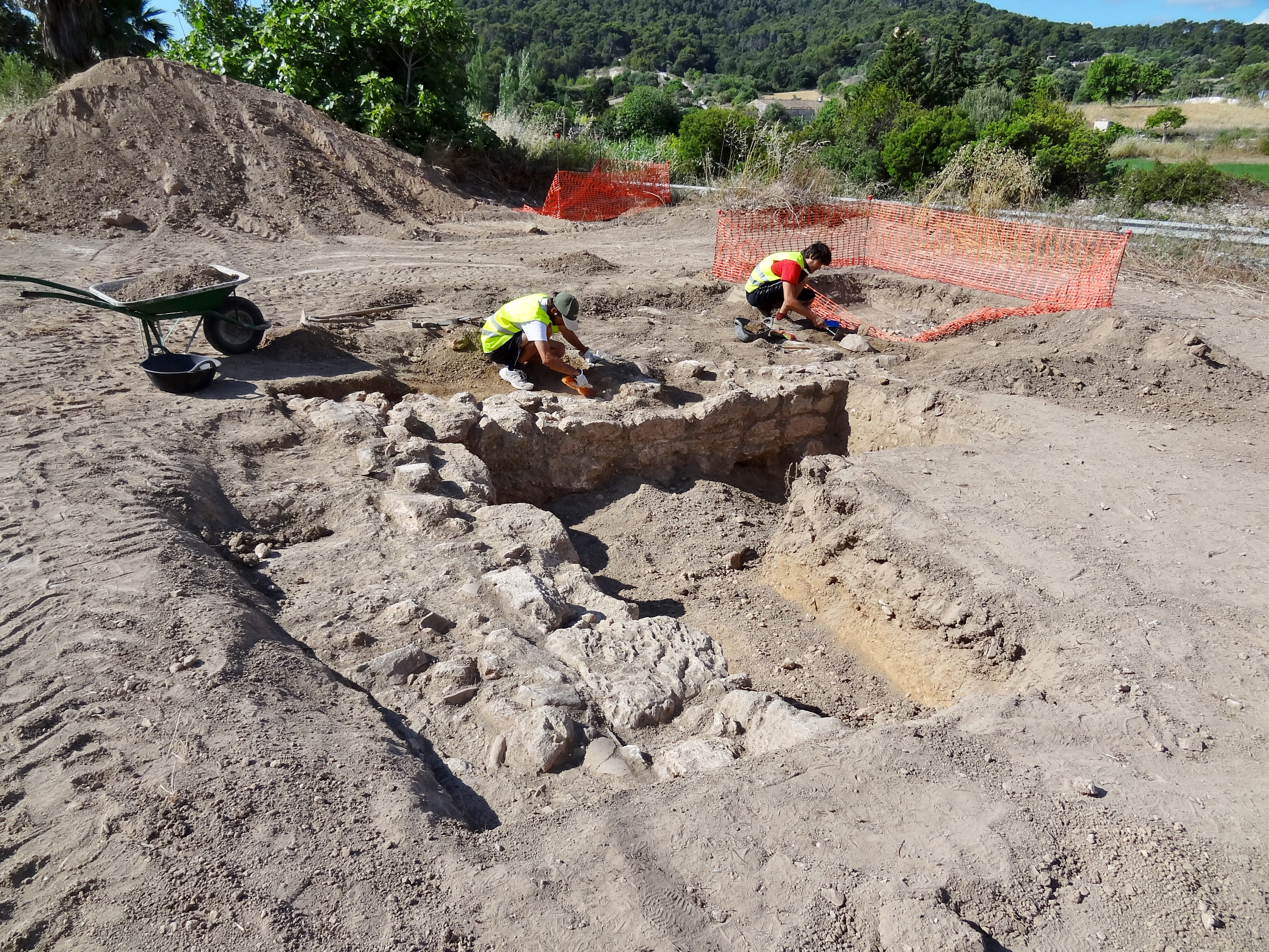 Ausgrabungsstätte an der Landstraße MA-4032 am Landgut Son Sard in der Gemeinde Son Servera, Mallorca, Spanien